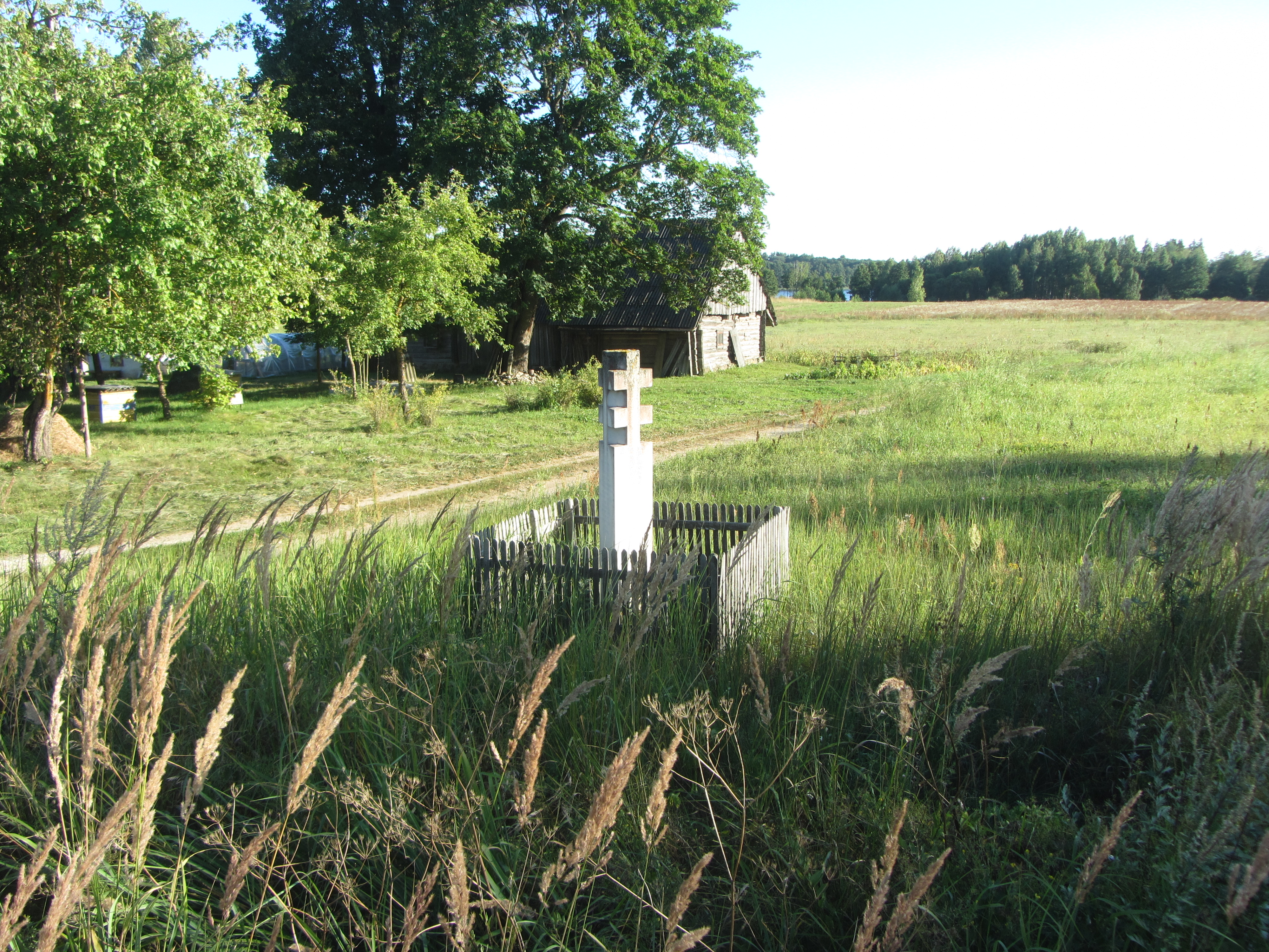 Užpalių sen., Lithuania